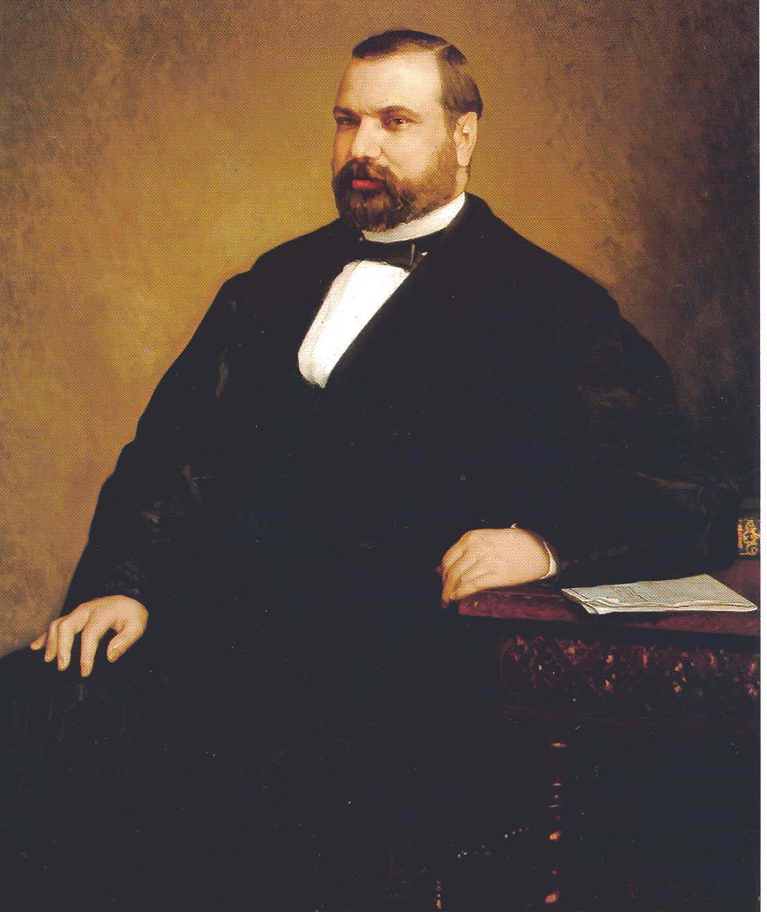 Retrato del politico español Nicolás María Rivero (c. 1815-1878), que llegó a ser alcalde de Madrid, presidente del Congreso de los Diputados y ministro de la Gobernación.